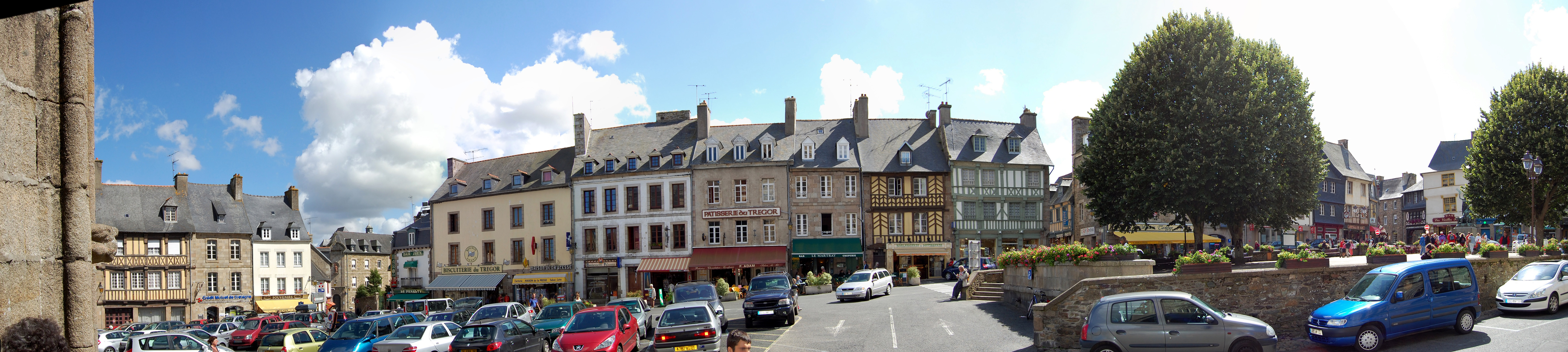 Place Martray de Tréguier, depuis le porche de la cathédrale, (France).